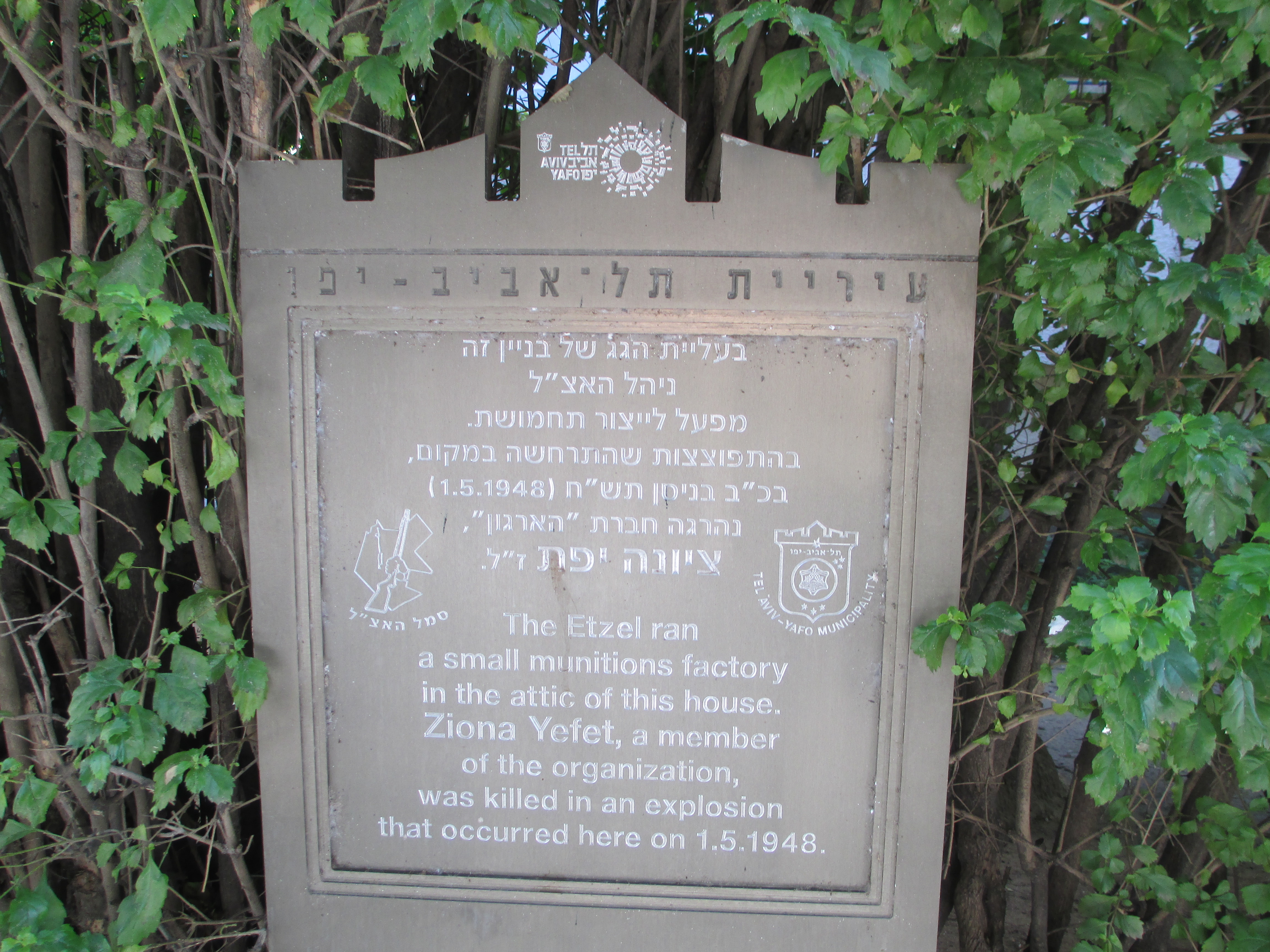 לוחית זיכרון ללוחמת האצ"ל ציונה יפת, ברחוב מאז"ה מס' 71 בתל אביב